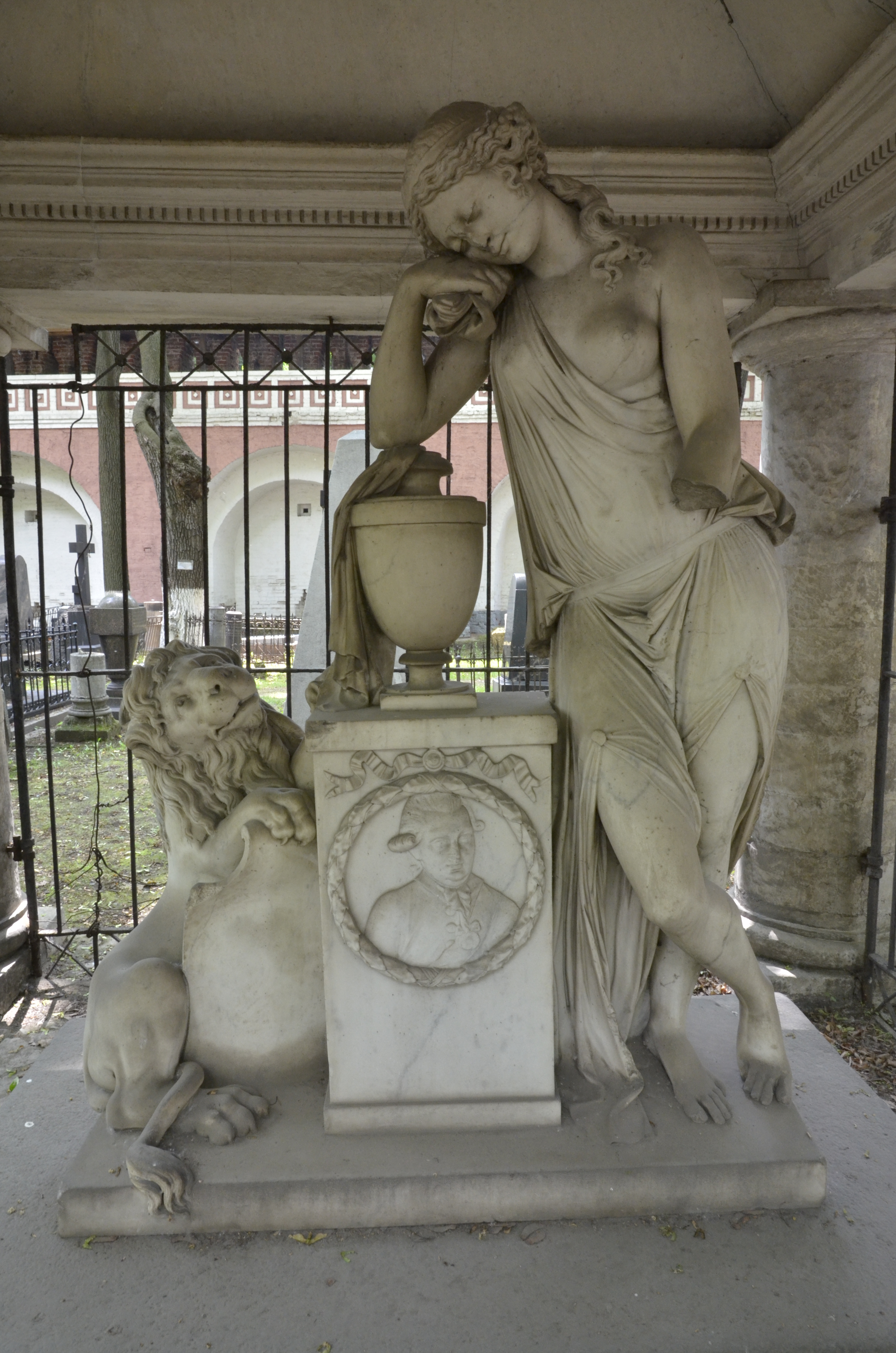 Монастырь Донской (Москва и Московская область, Москва, Донская площадь, 1)